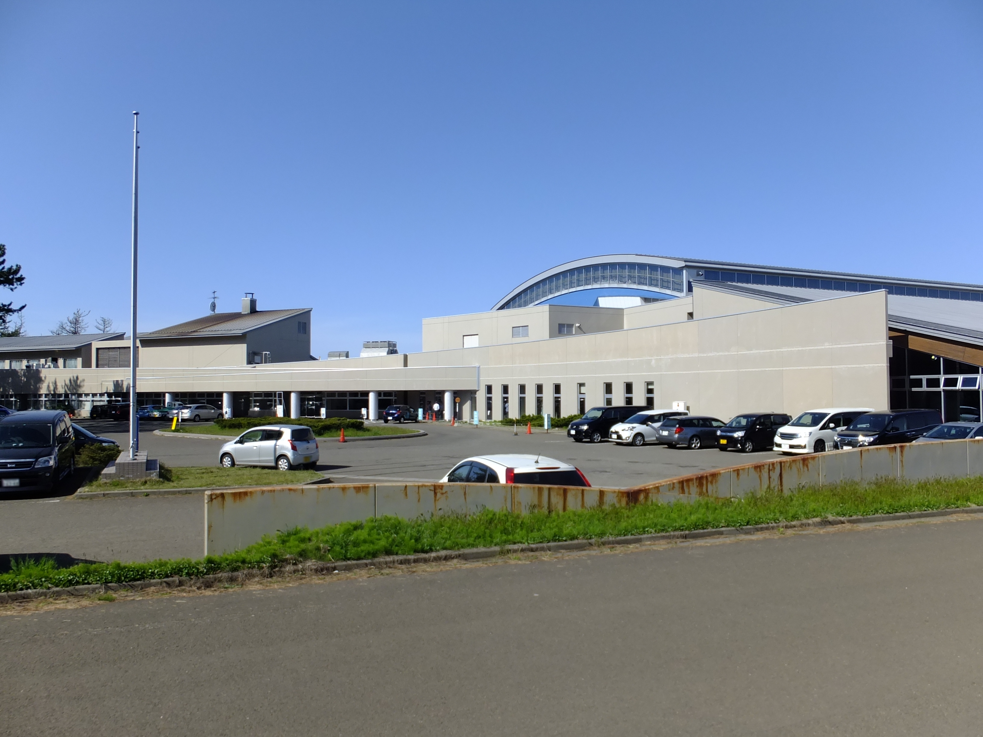 能代山本スポーツリゾートセンター、アリナス。周囲には能代球場や能代温泉がある。